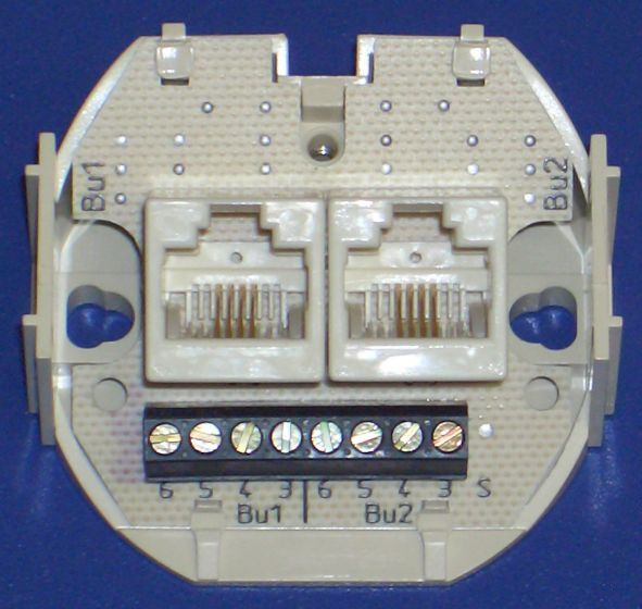 UAE mit 2 getrennten 4-polig bestückten Buchsen, Aufputz-Ausführung